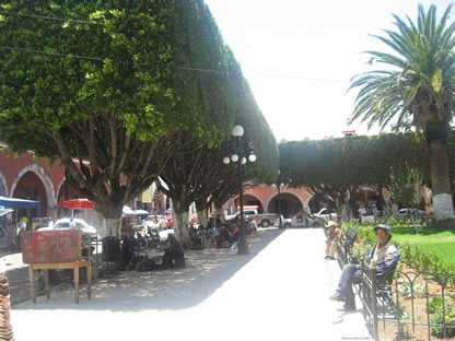 Preciosa estampa de Maravatío — Michoacan